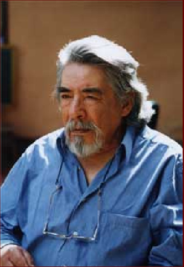 Carlos Salazar Mostajo